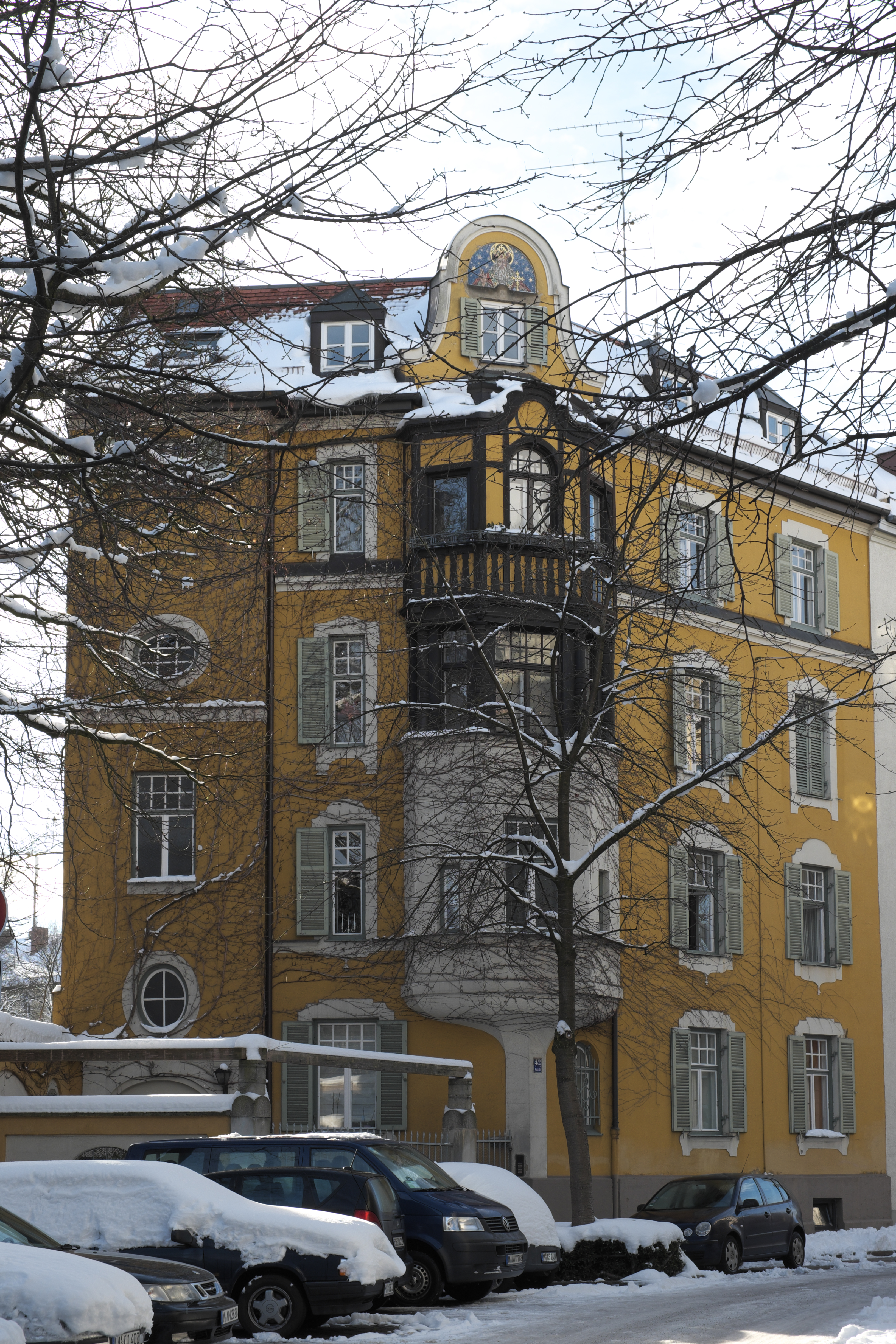 Mietshaus in der Metzstraße 42 in Haidhausen im Stadtbezirk Au-Haidhausen in München (Bayern/Deutschland), um 1900, mit Eckerker